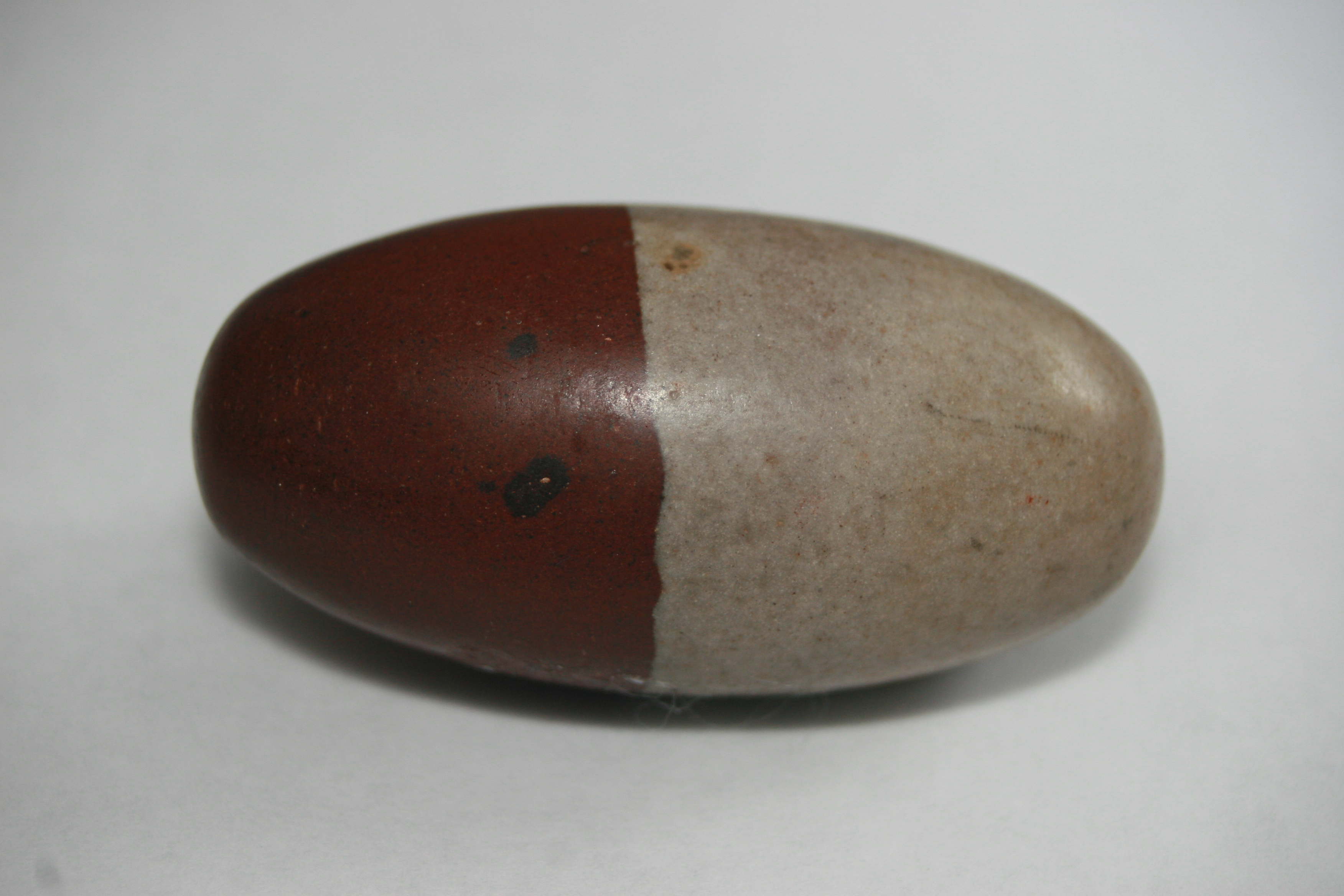 Shivalingam